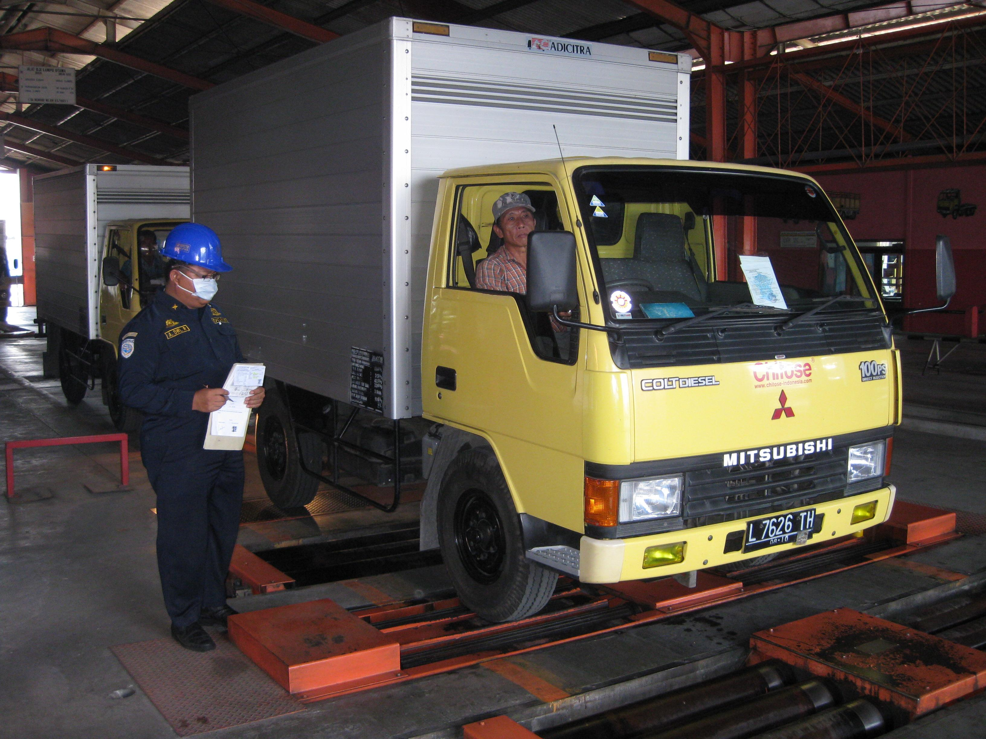 Sebuah truk box sedang diuji remnya di Pengujian kendaraan bermotor yang berada di Tandes Surabaya.